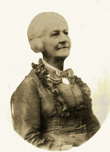 Elvira Herminia Goulart Penteado